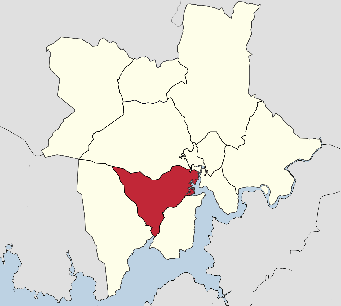 Parroquia de San Xoán de Roo en Outes